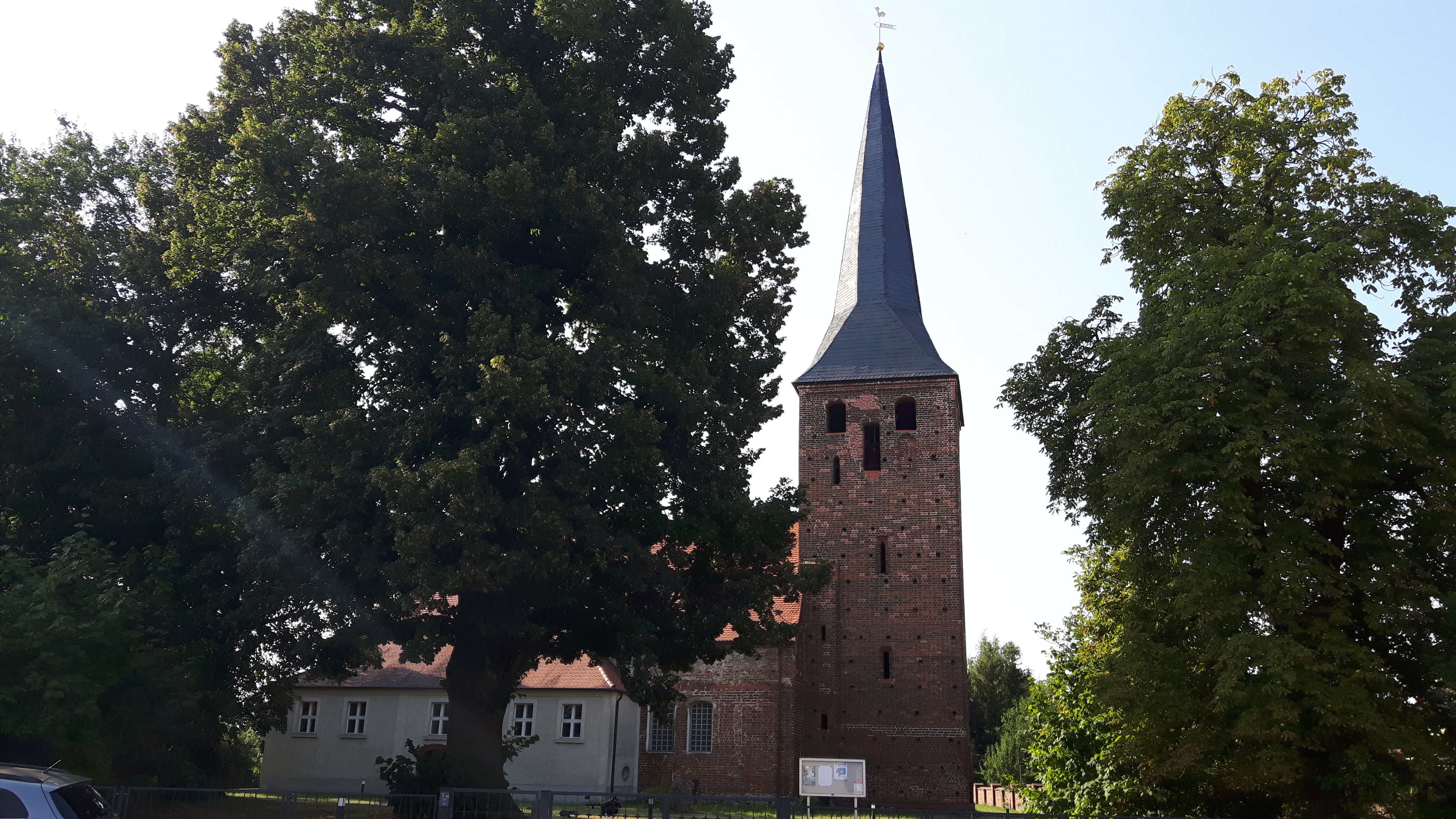 Die Dorfkirche Krieschow wurde im 15. Jahrhundert als Feldsteinkirche errichtet. Hier ist die Kirche aus nördlicher Richtung aufgenommen.